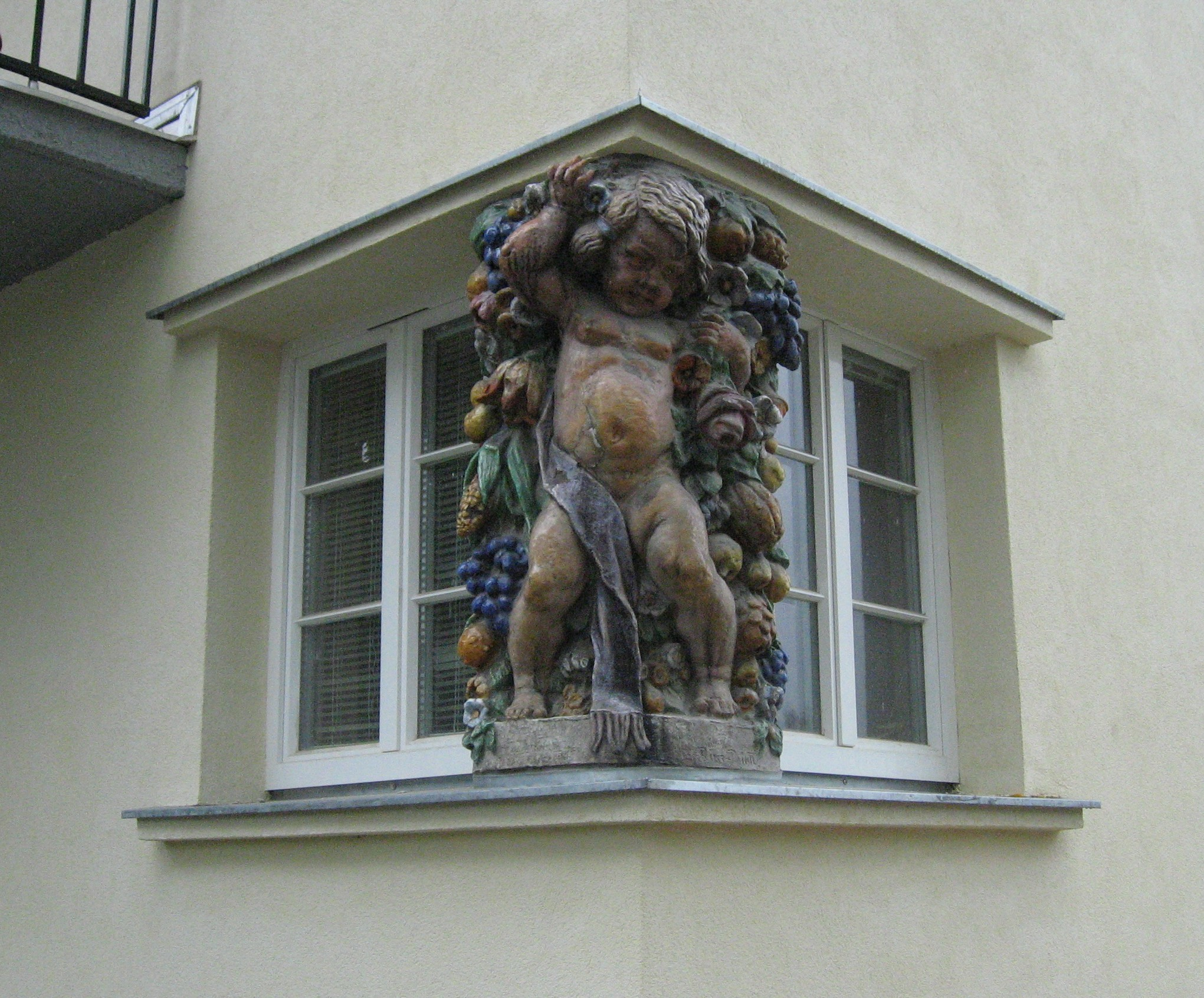 Wohnhausanlage Langobardenstraße 207 in Wien-Donaustadt, Putte